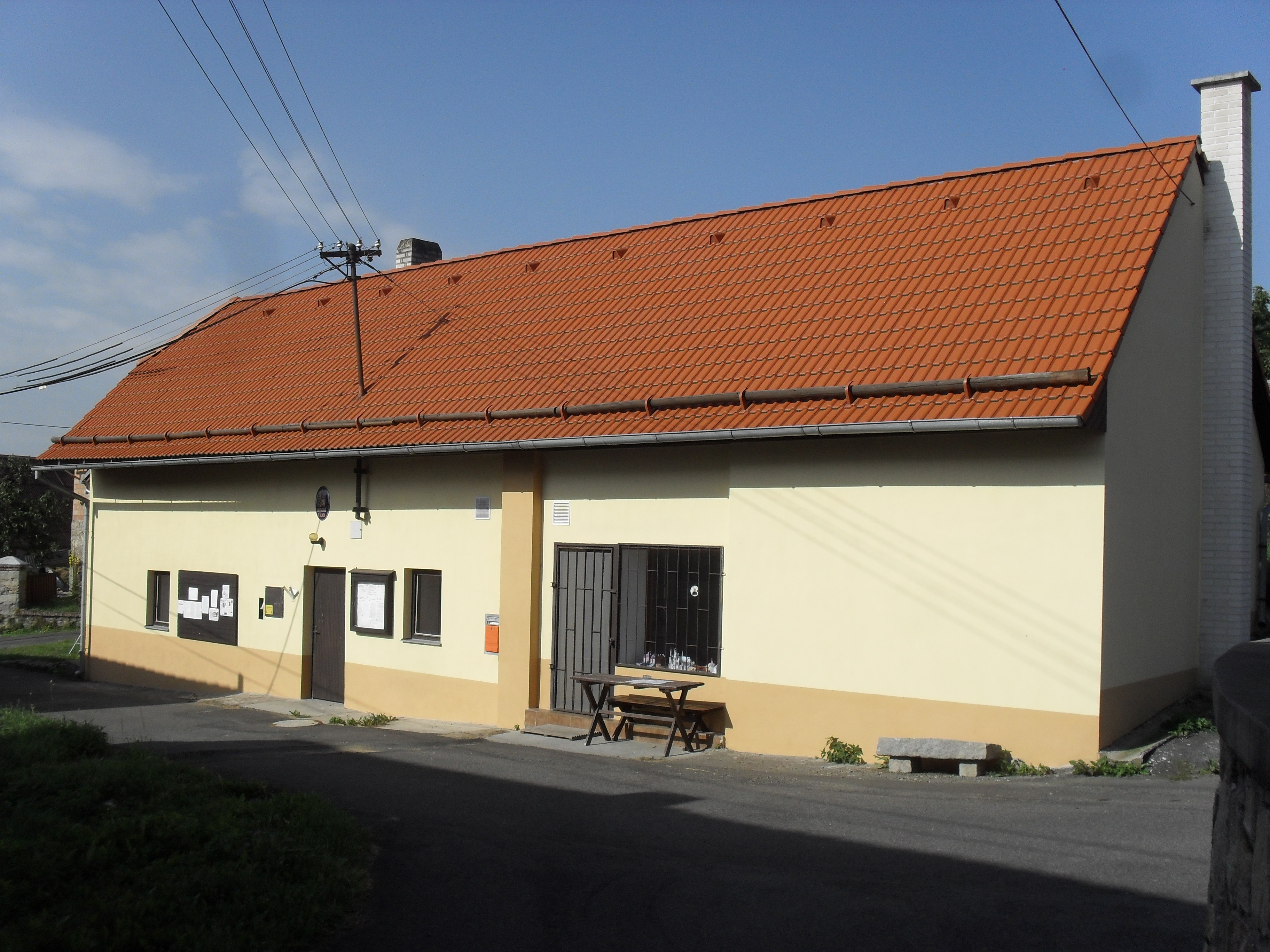 Fotografie pořízena v obci Maňovice.